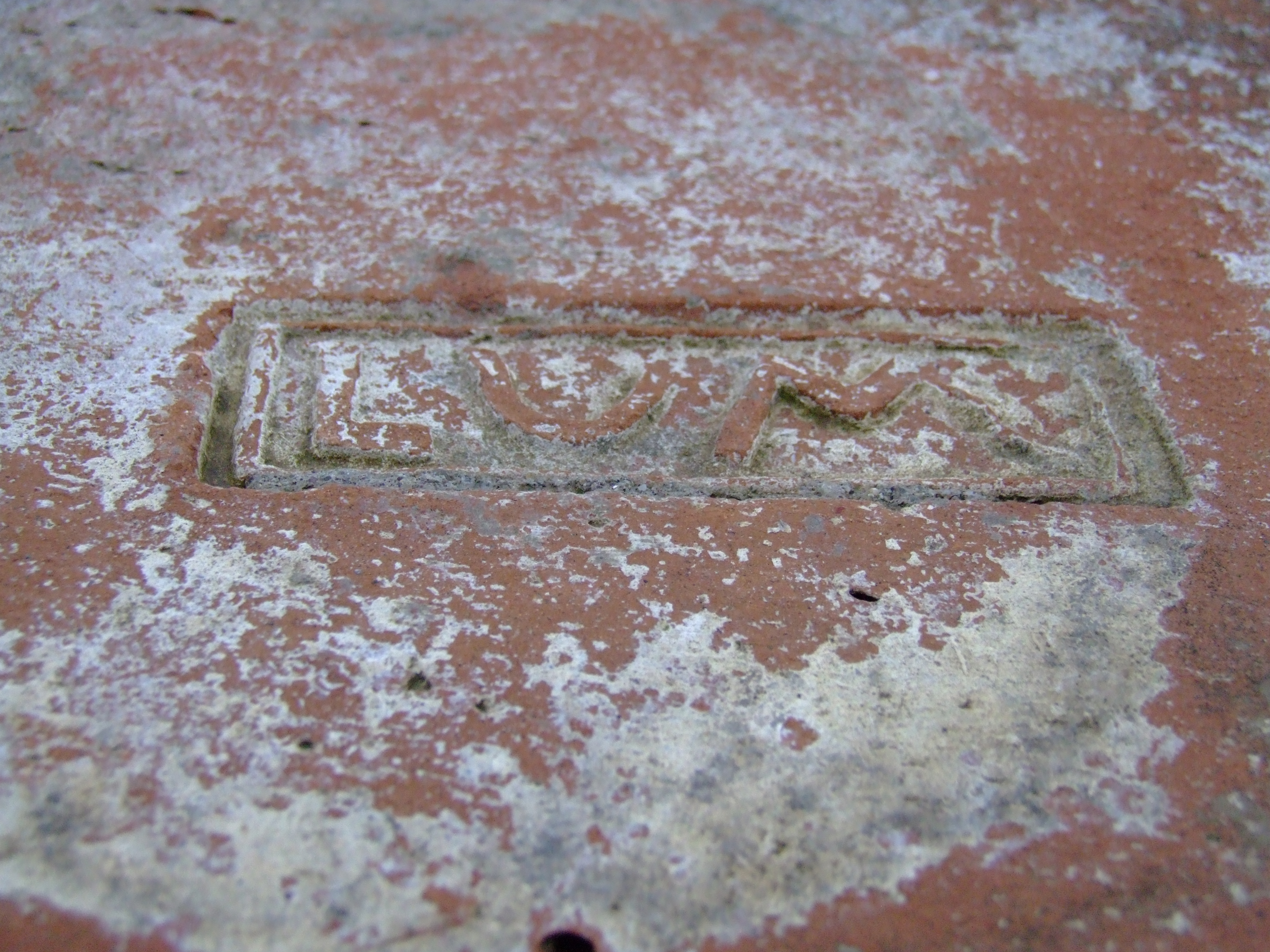 Legio V Macedonica, Potaissa marked brick